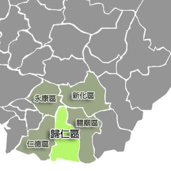 歸仁區相對位置